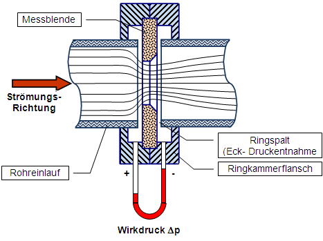 Messblende mit Eckdruckentnahme im Ringkammerflansch nach ISO 5167-2